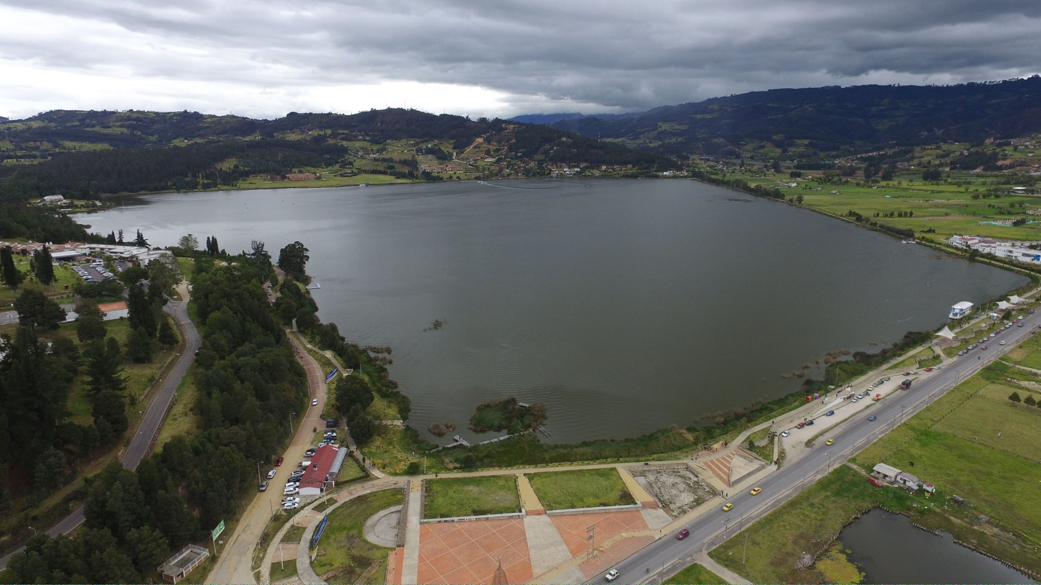 Lago de sochagota vista aérea